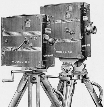 Deux modèles de caméras 35 mm Urban Bioscope (1902). Conçues par le Britannique Charles Urban.